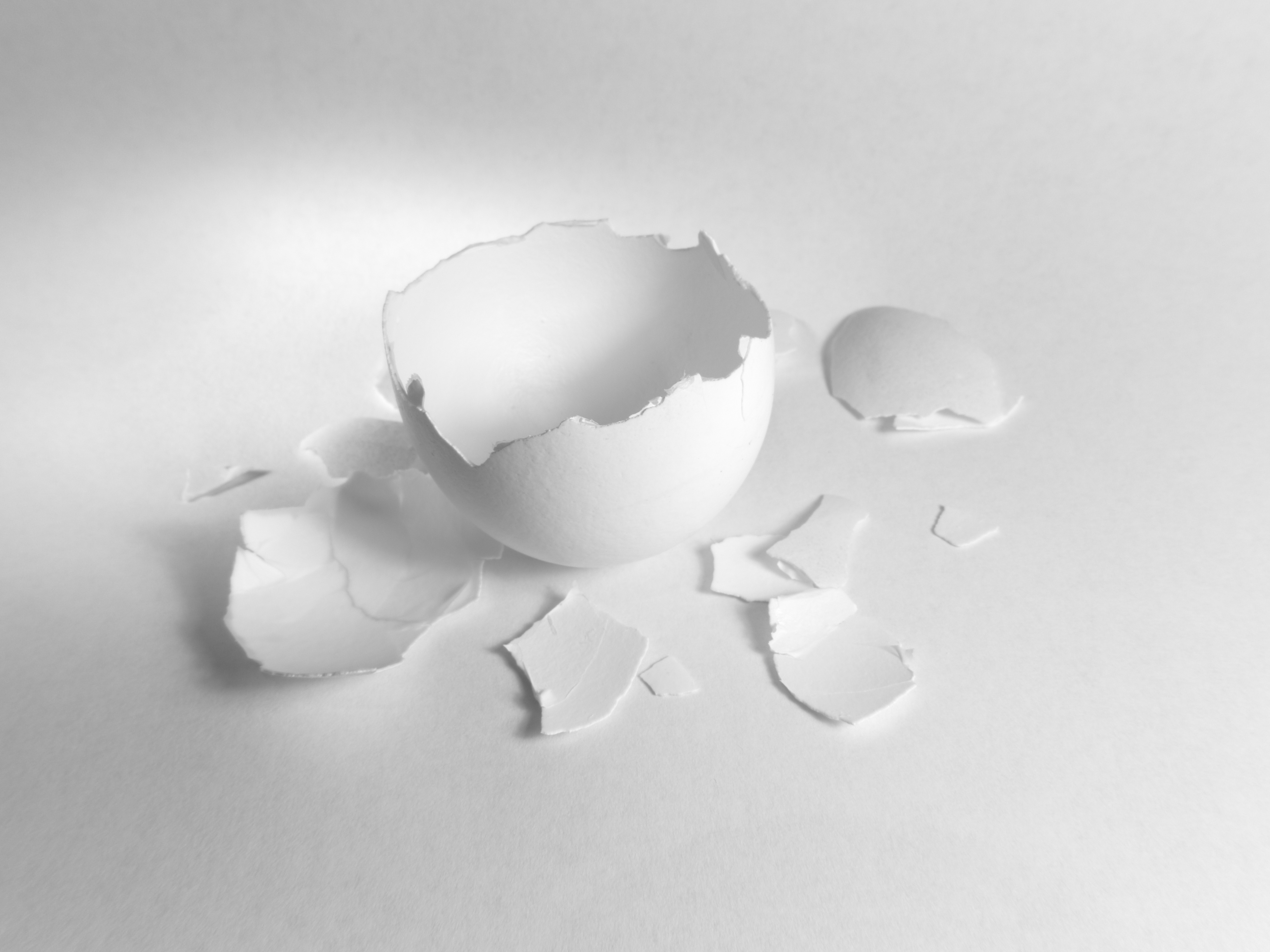 Schale eines Frühstückseis